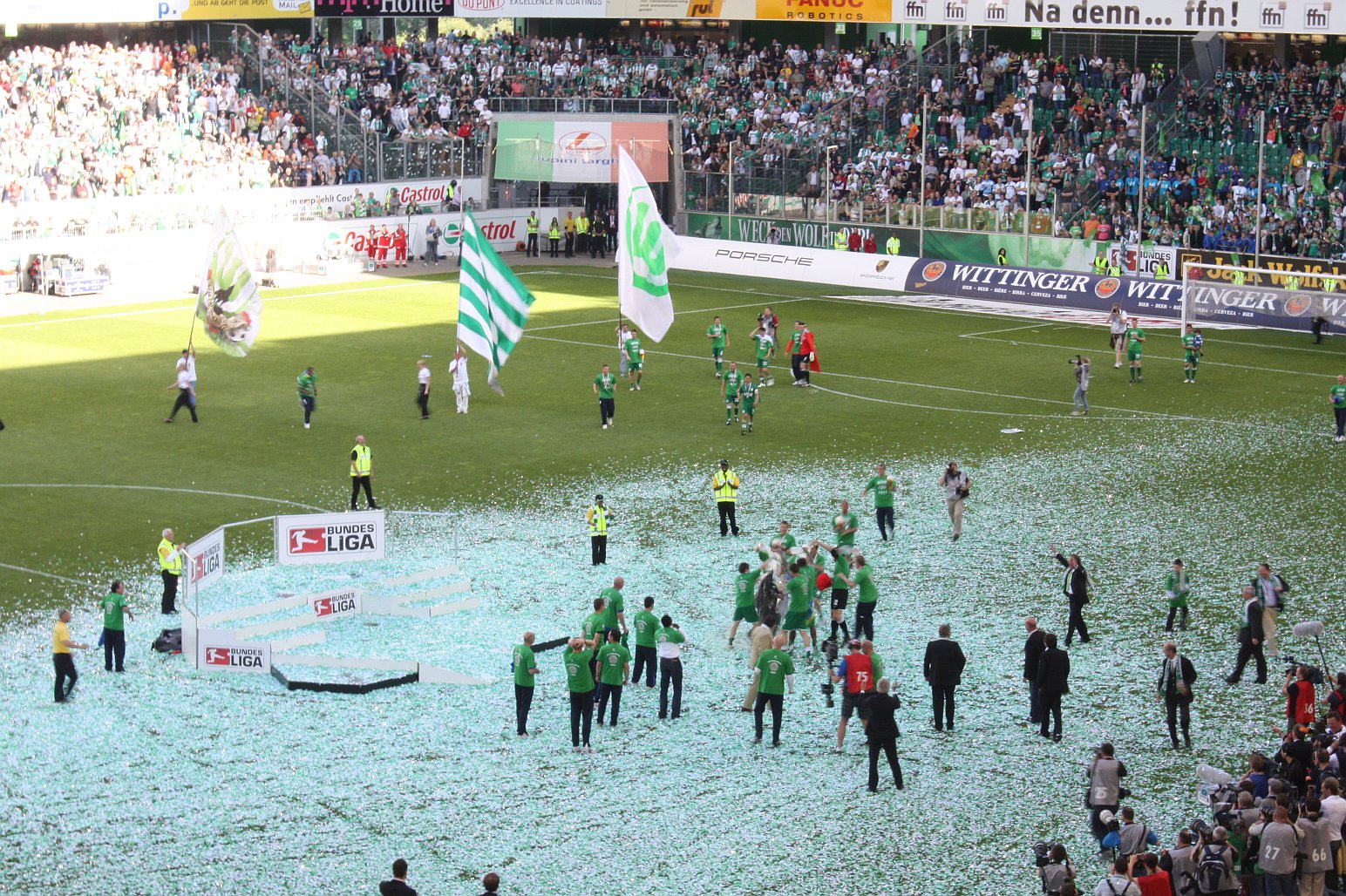 VfL Wolfsburg - Werder Bremen (5:1) 23.05.09 Bierduschen der Spieler nach der Titelverleihung.